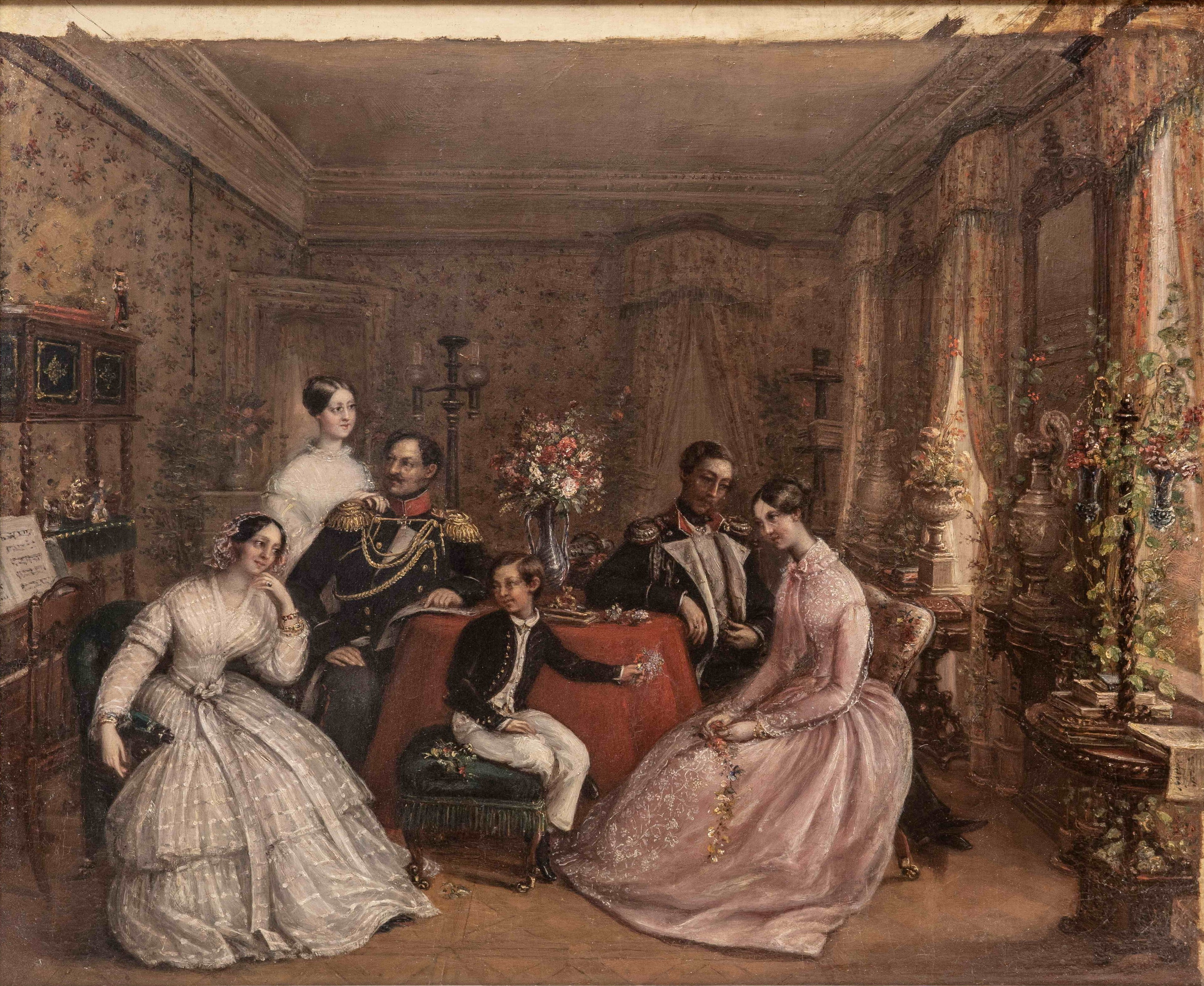 Помолвка княжны Елизаветы Александровны Чернышевой и князя Владимира Ивановича Барятинского